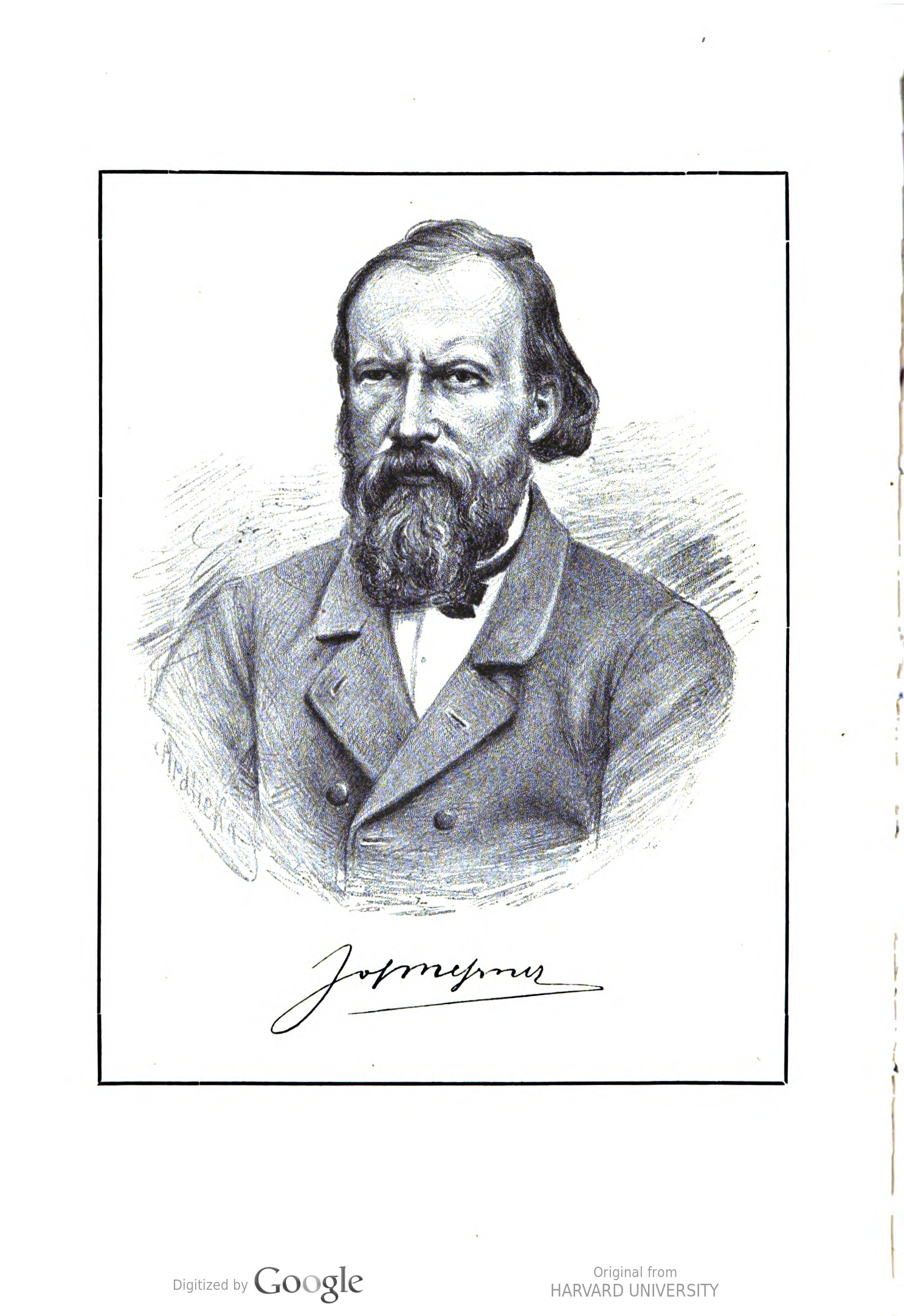 Josef Messner (1822-1862), německý spisovatel